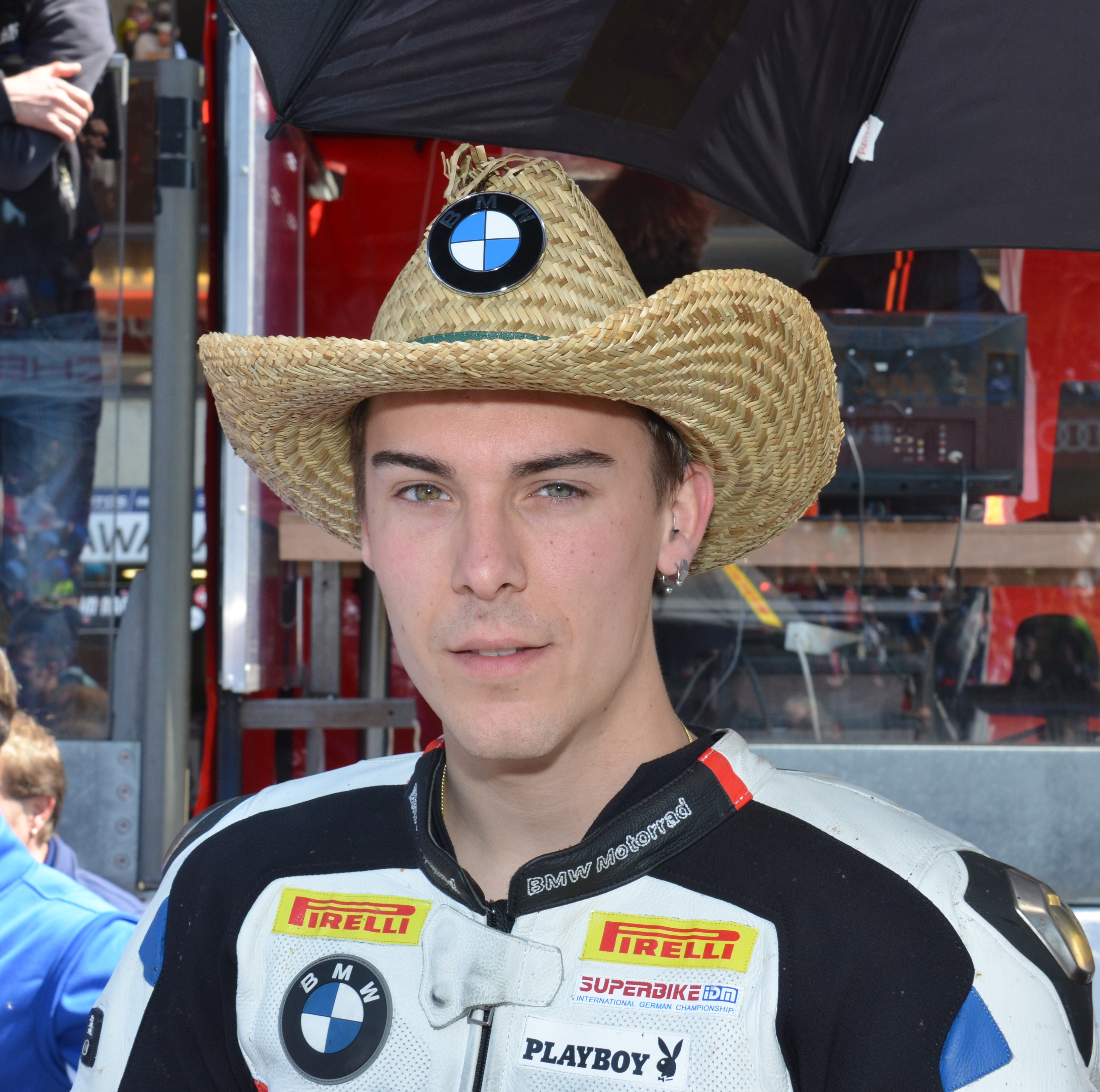 Markus Reiterberger 24 Heures Moto 2015.